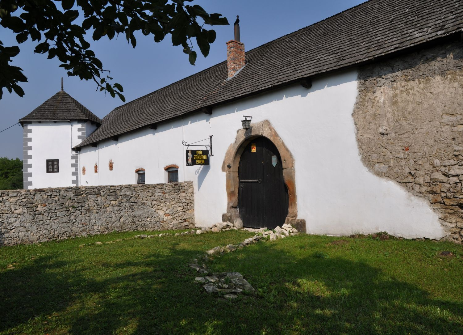 Sobków - fortalicja wzniesiona w latach 1560-1570 przez Stanisława Sobka z Sułowa